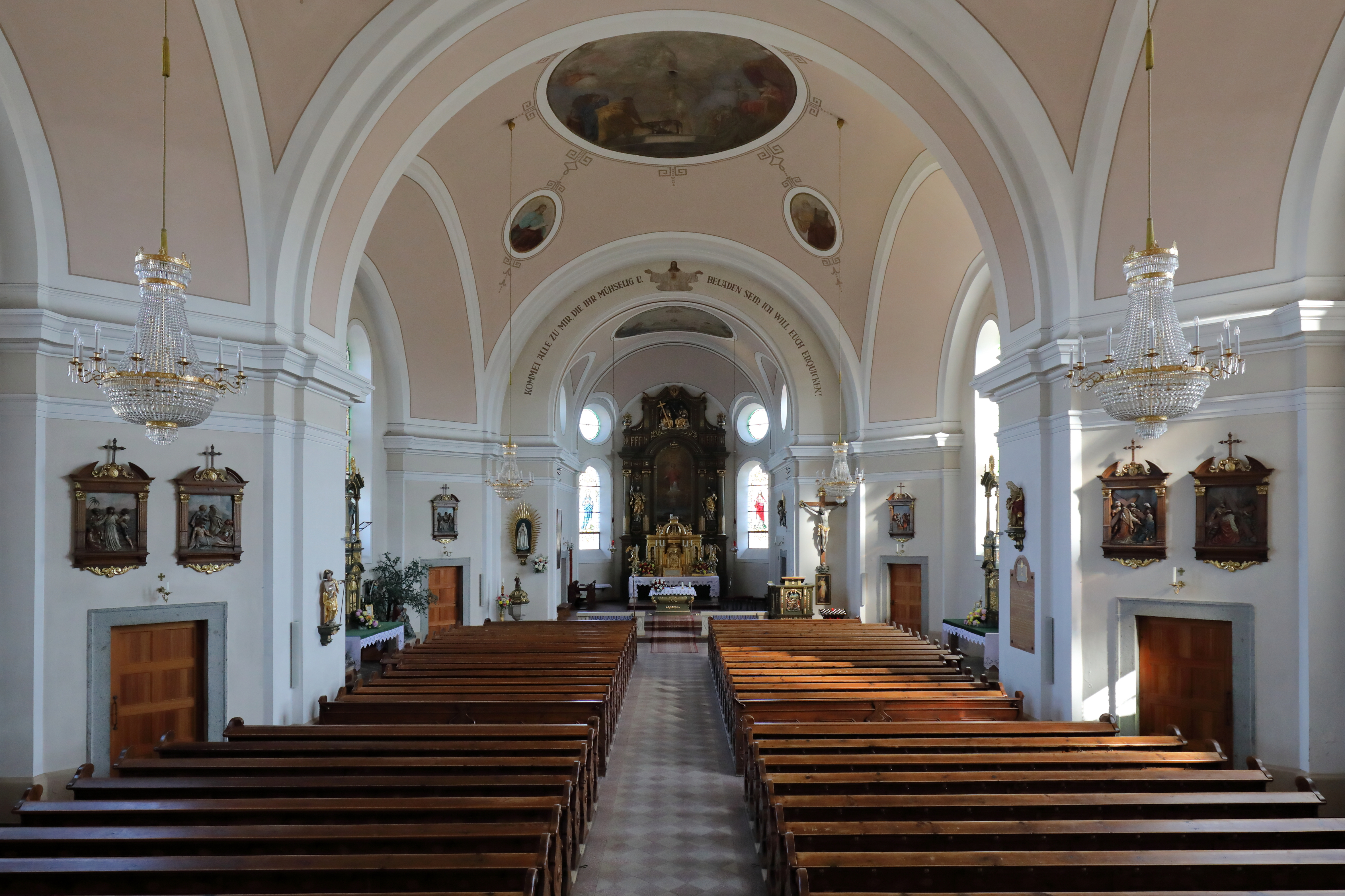 Innenansicht der röm.-kath. Pfarrkirche hl. Laurenz in der oberösterreichischen Gemeinde Schardenberg.Die Kirche mit 600 Sitzplätzen wurde ab 1908 nach den Plänen des Dombaumeisters Matthäus Schlager erbaut und am 9. August 1910 von Bischof Rudolf Hittmayr eingeweiht. Der barocke Turm aus dem Jahr 1741 stammt noch von der Vorgängerkirche. Die Einrichtung wie Hochaltar und Seitenaltäre sind vorwiegend Werke des Ottensheimer Bildhauers Simon Rabeder (1862–1941) bzw. wurden nach seinen Entwürfen gefertigt und stammen aus der Zeit von 1910 bis 1915. Die Fresken im Innenraum stammen von Engelbert Daringer (1882–1966) aus Wildenau (Gemeinde Aspach) und entstanden zwischen 1920 und 1922.